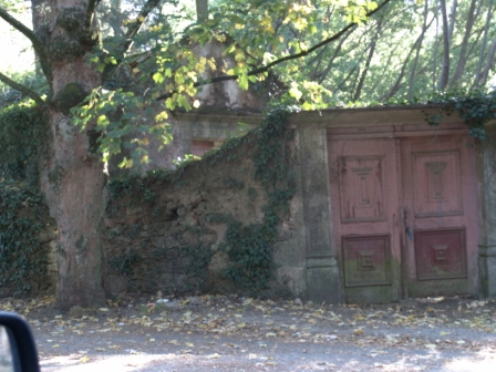 Imagem da entrada da Quinta do outeiro em Cesar, Oliveira de Azeméis, Portugal.